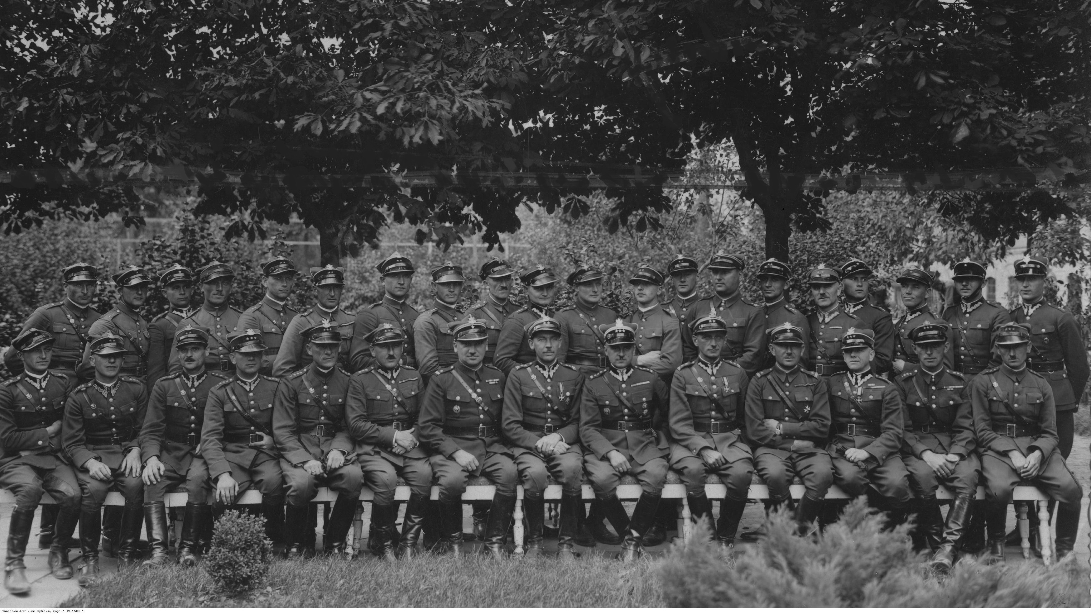 Święto 7 Pułku Artylerii Lekkiej w Częstochowie w październiku 1934 r. Fotografia grupowa korpusu oficerskiego 7 pal-u (do 1930 r. 7 Pułk Artylerii Polowej) w Częstochowie z dowódcą płk. dypl. Józefem Kapciukiem (siedzi, szósty z prawej). Koncern Ilustrowany Kurier Codzienny - Archiwum Ilustracji. Sygnatura: 1-W-1503-1